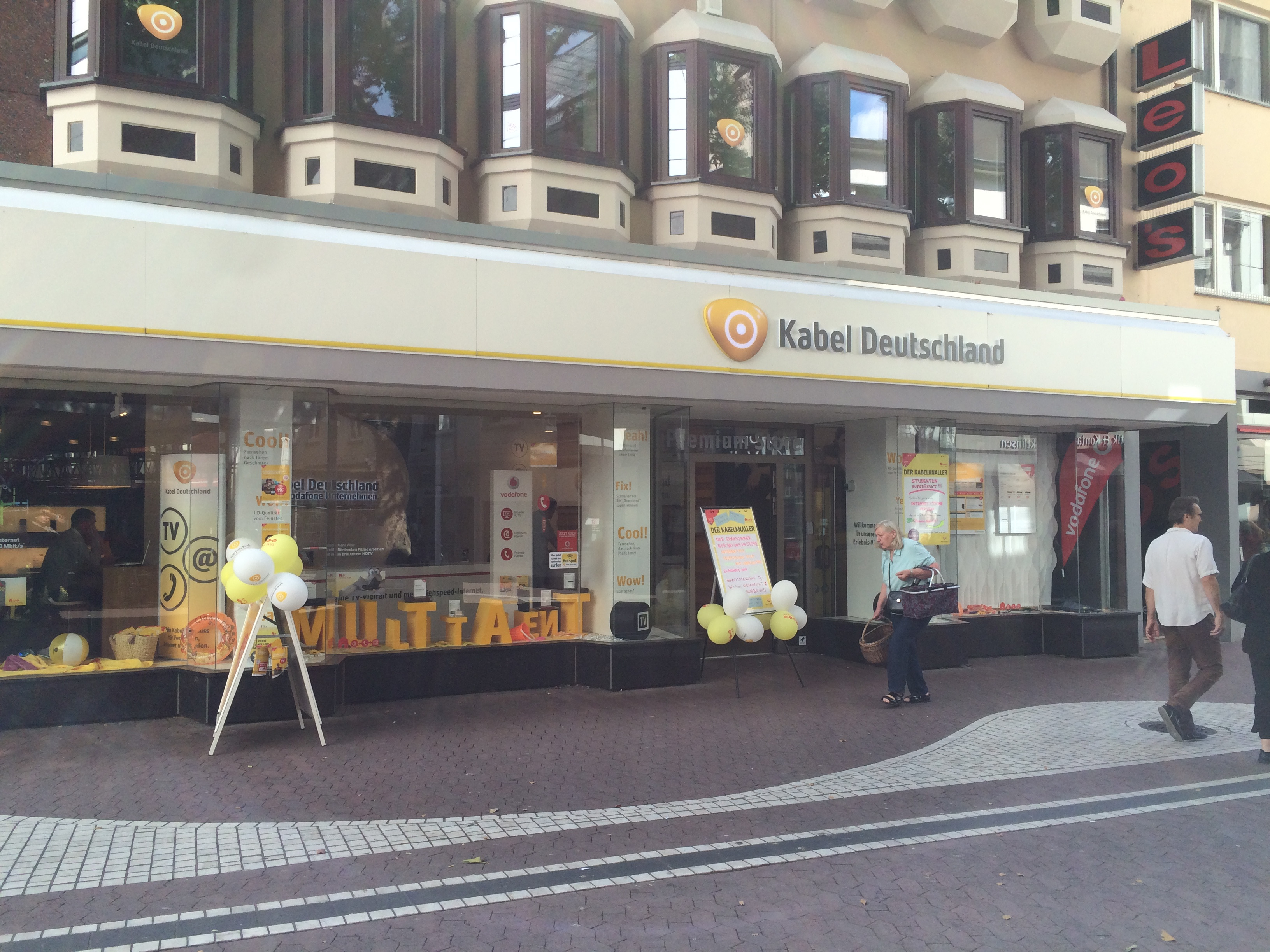 Kabel Deutschland Shop